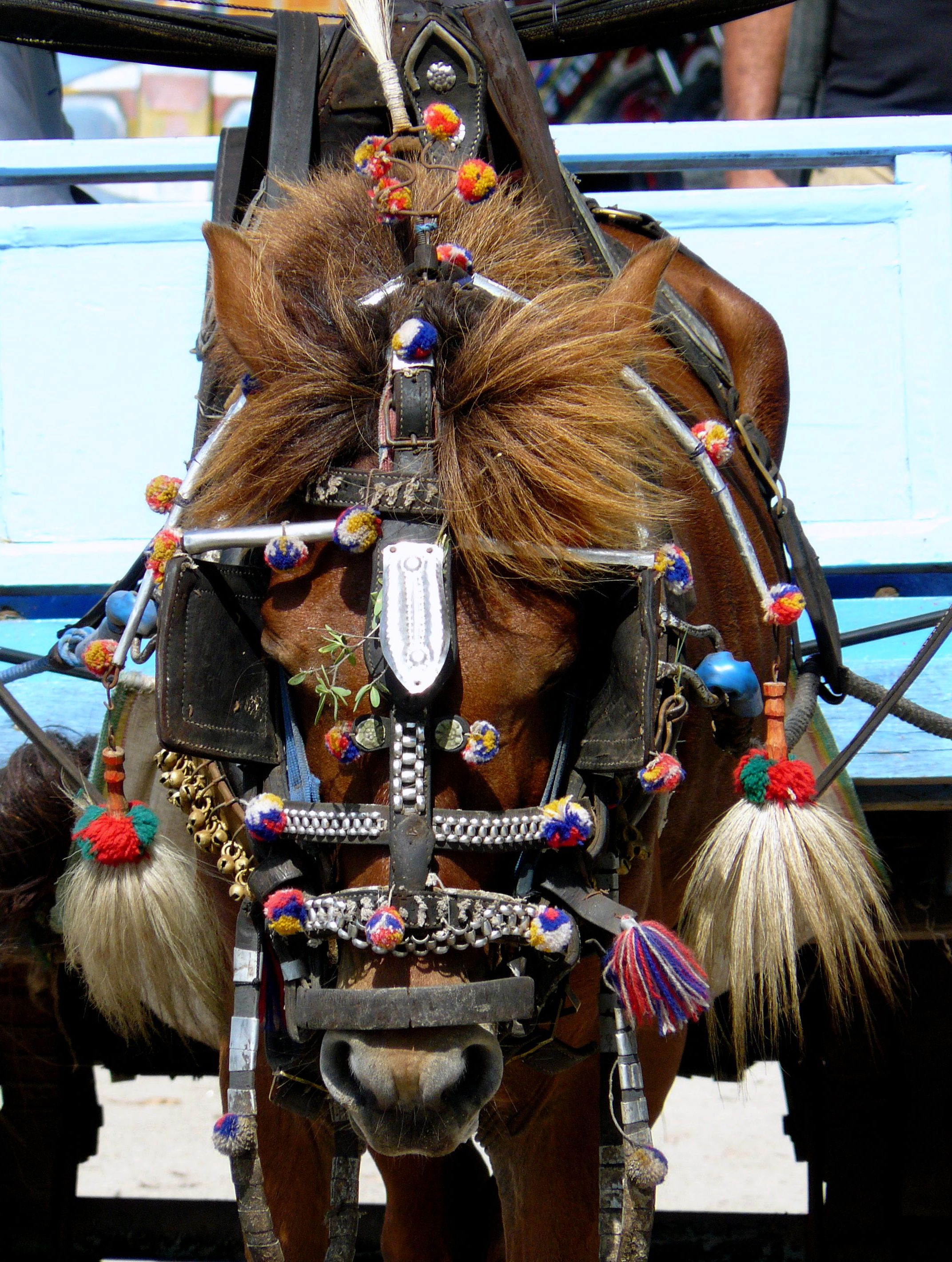 Cidomo, Gili Trawangan, Indonesia